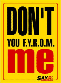 Say Macedonia